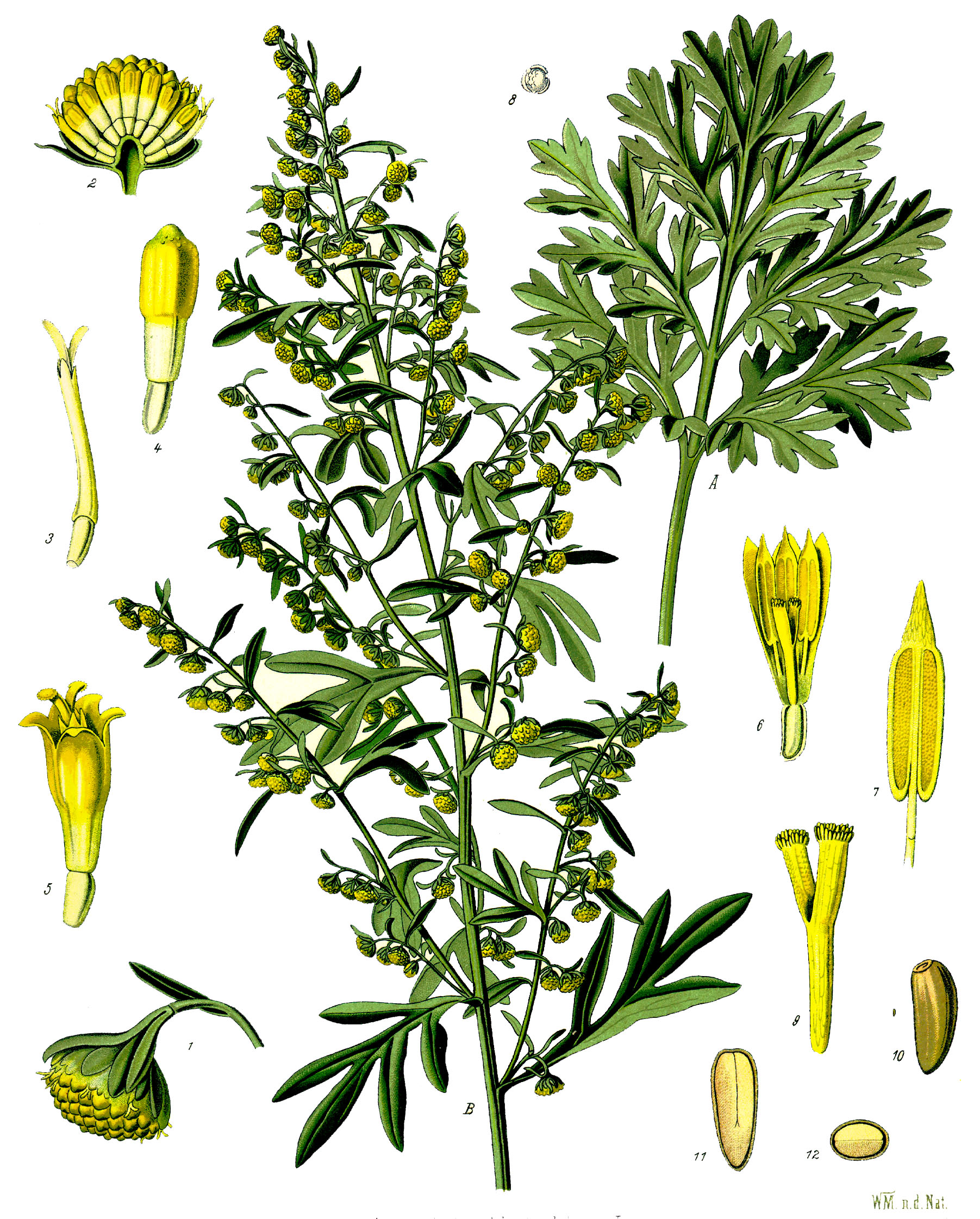 Gemeiner Wermut. A Wurzelblatt und B blühender Stengel eines im Garten gezogenen Exemplars; 1 Blüthenköpfchen vergrössert; 2 dasselbe im Längsschnitt, desgl.; 3 Randblüthe, desgl.; 4 und 5 Scheibenblüthe auf verschiedenen Entwickelungsstufen, desgl.; 6 dieselbe zerschnitten, desgl.; 7 Staubgefäss, desgl.; 8 Pollen, desgl.; 9 Griffel mit Narben, desgl.; 10 Frucht, desgl.; 11, 12 dieselbe im Längs- und Querschnitt.